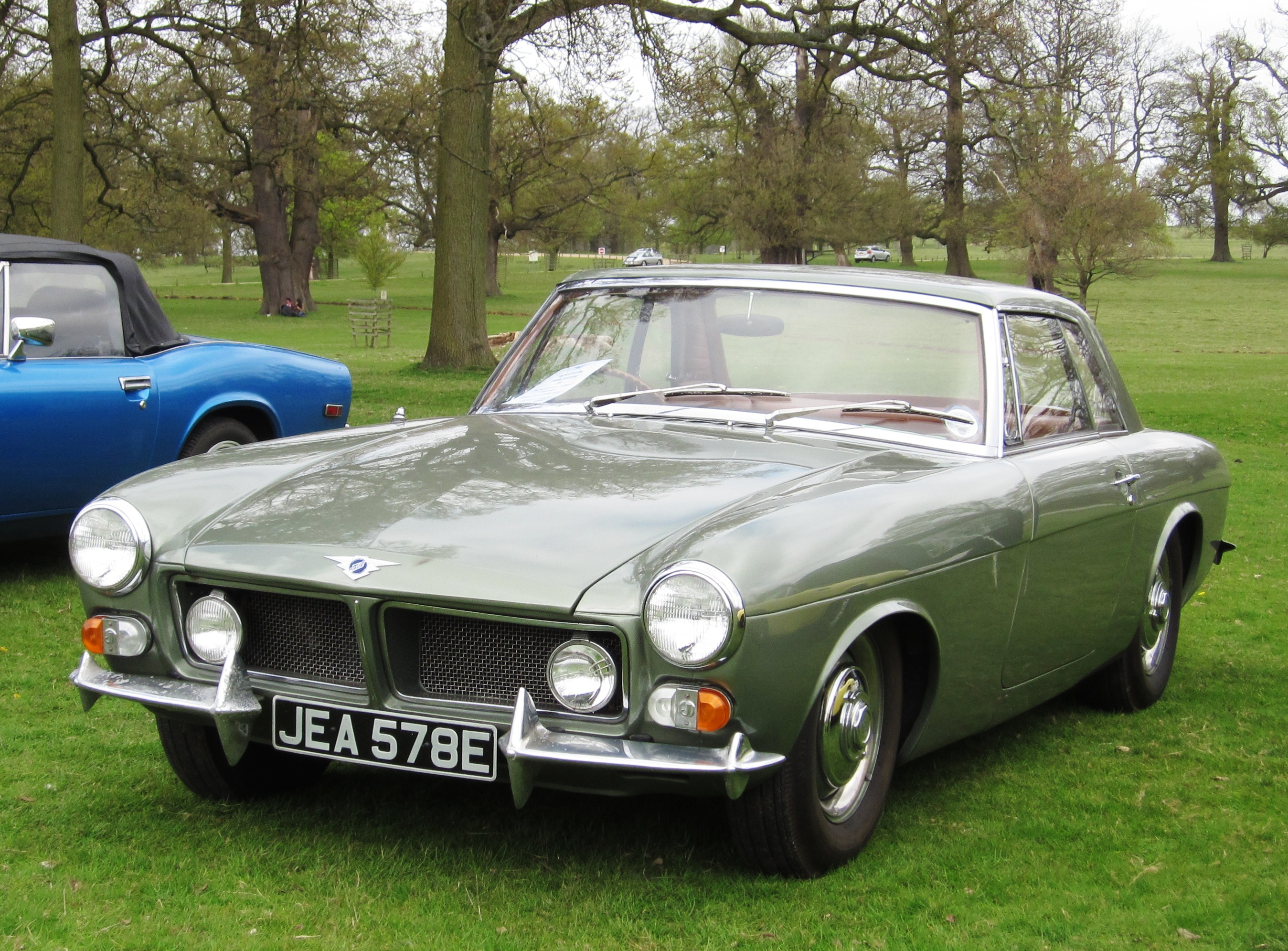 Jensen P66 (prototype 1966) from before the contract for bodying the replacement Interceptor went to Italy The blue car next door is a Jensen Healey. I think ...Charles01 (talk) 09:21, 13 November 2016 (UTC) (the photographer)